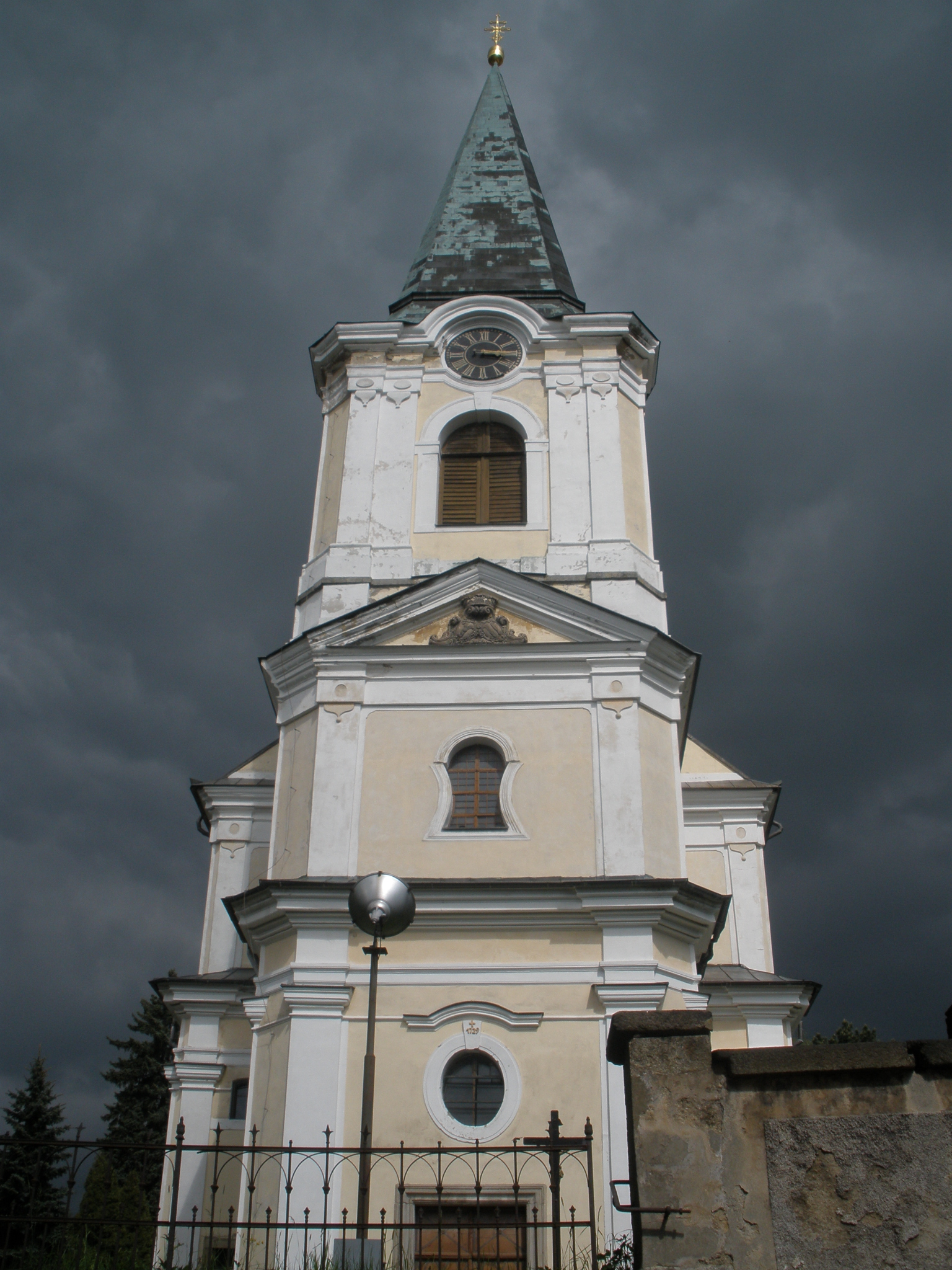 Jiříkov, okres Děčín. Věž kostela sv. Jiří, pohled zpředu, směrem od pošty.